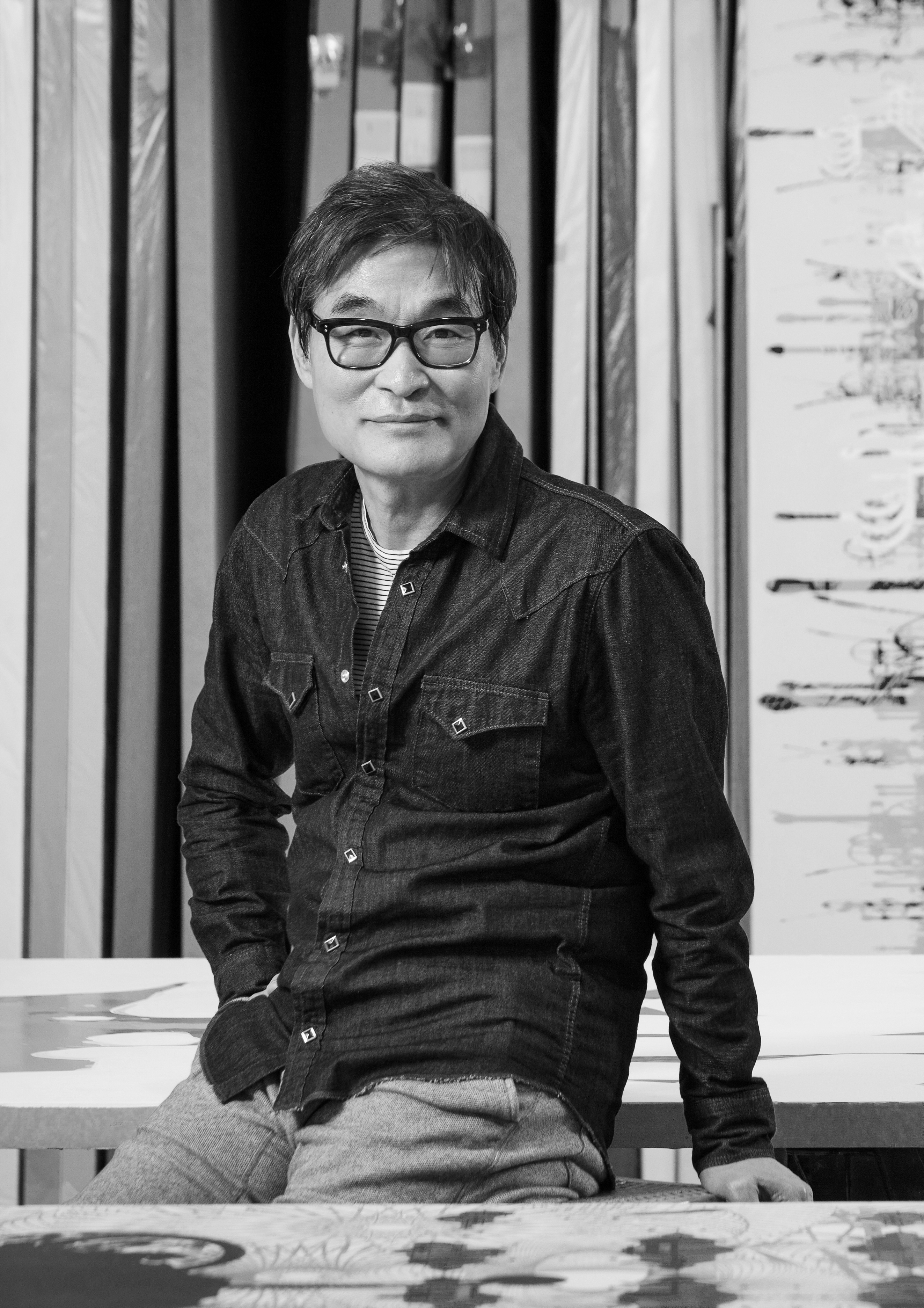 이상남 프로필사진